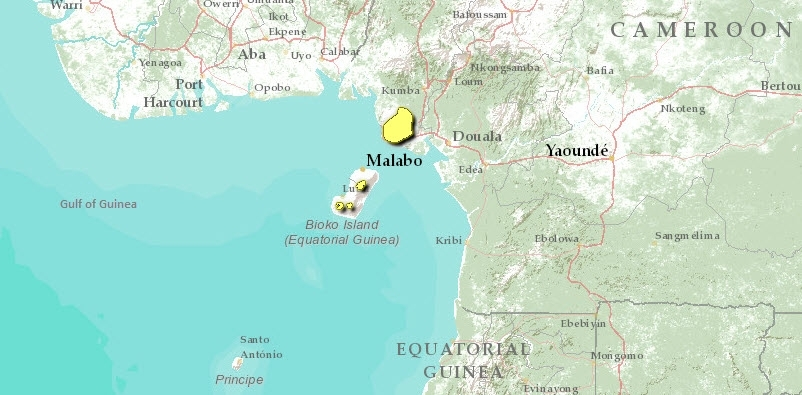 Mappa Ecoregione AT0121 - Foreste montane del Monte Camerun e di Bioko